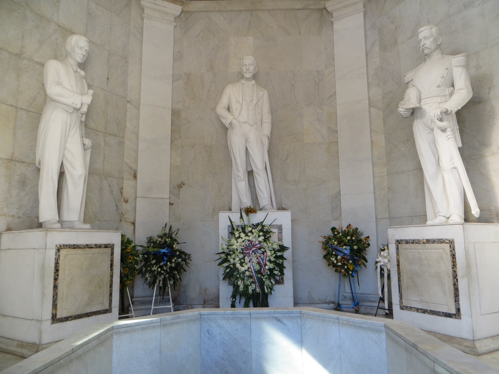 Santo Domingo (Rep. Dominicana) (71)